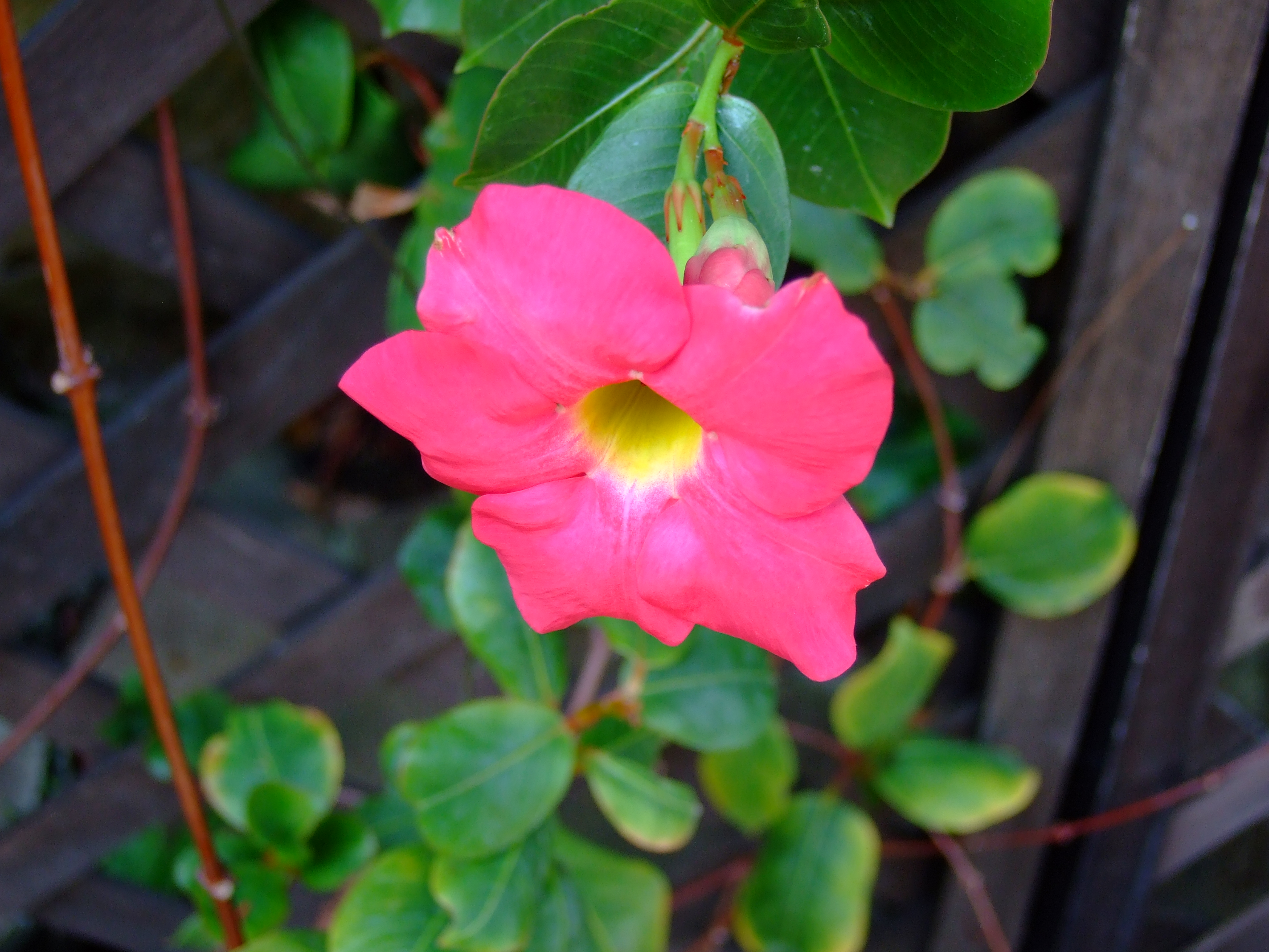 兵庫県立フラワーセンター